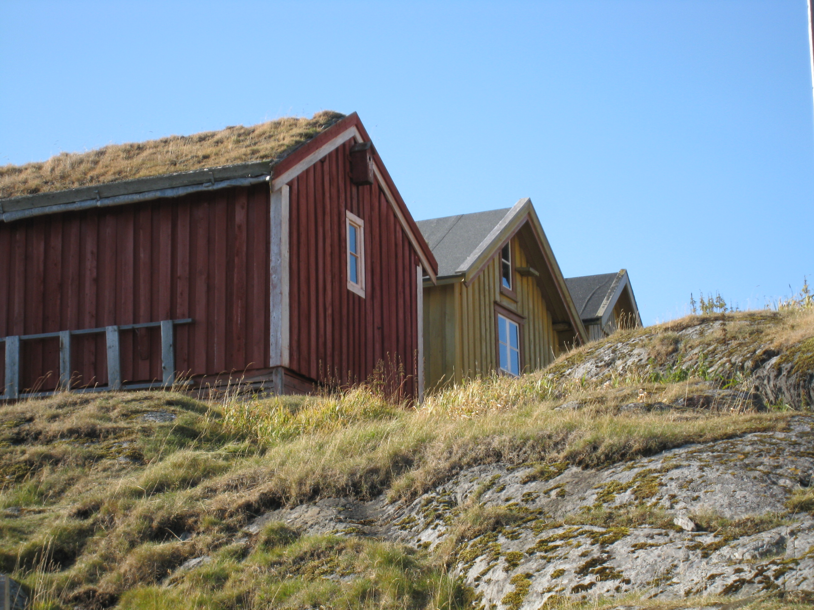 Vegaøyan i Nordland.